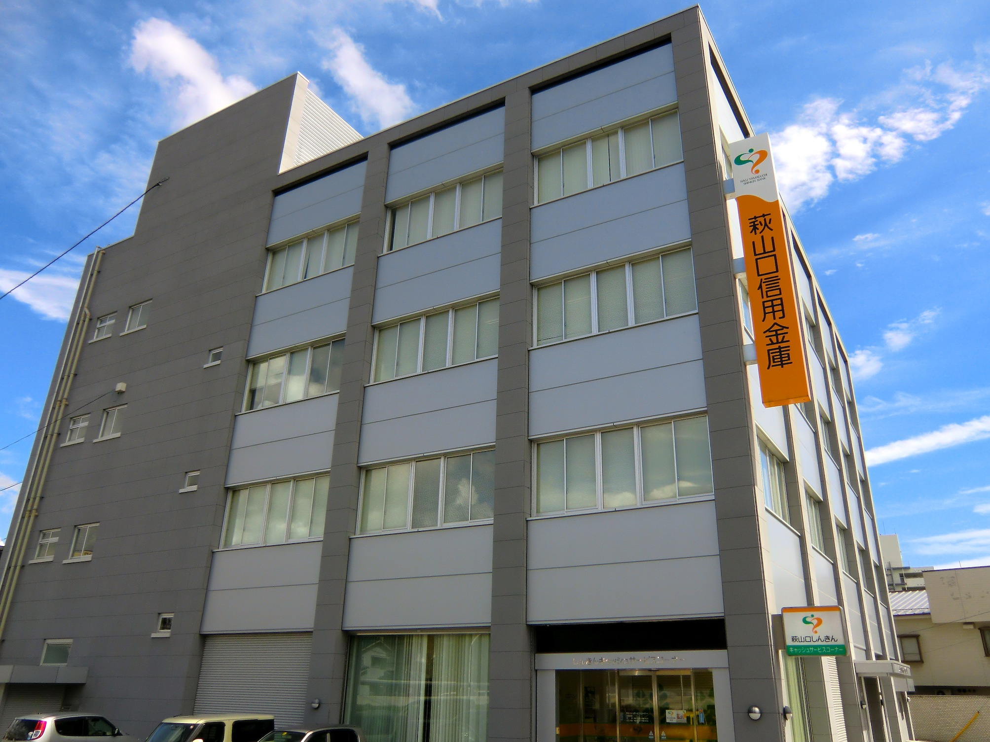 萩山口信用金庫の本店（山口県山口市）